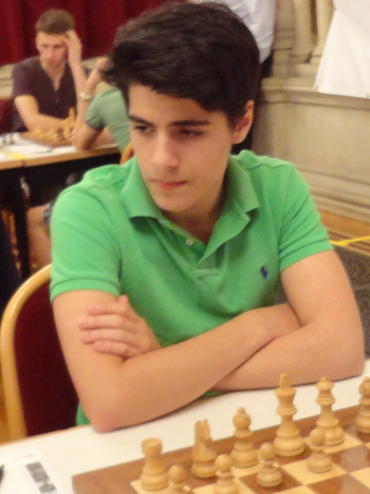 Aryan Tari, Vienna Chess Open 2015 in Wien.